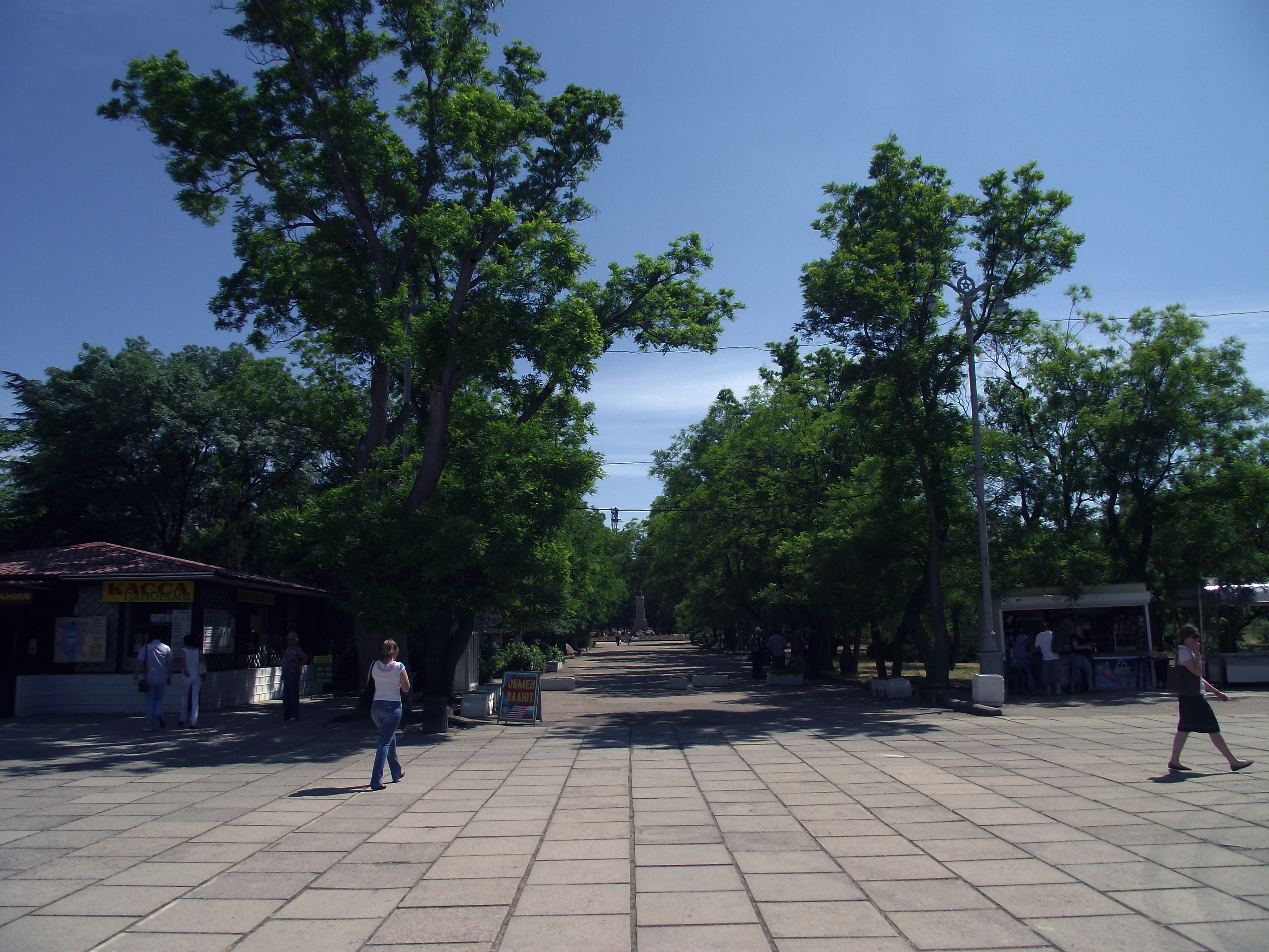 1905 - 1959 роки